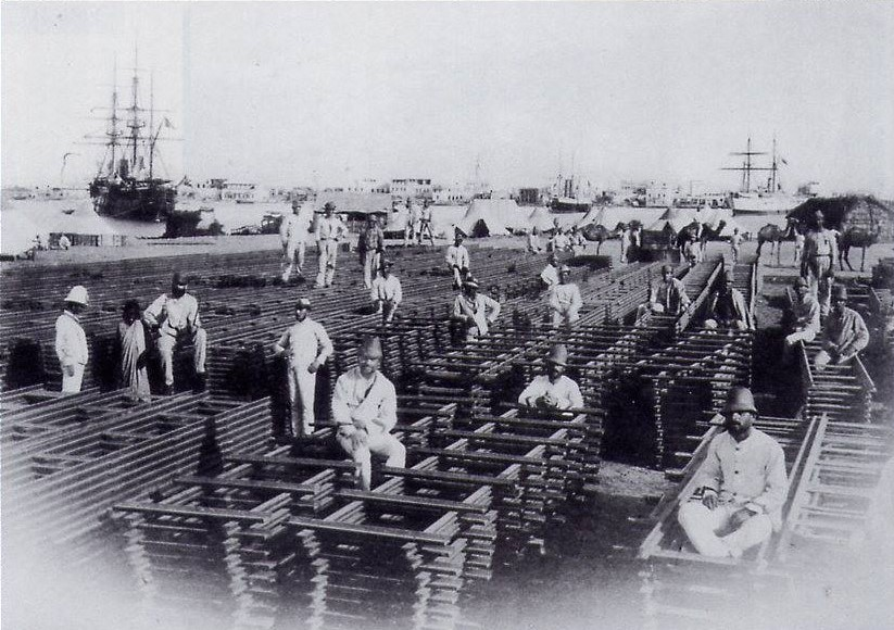 Massaua 1886. Veduta del campo Gherar. Soldati de Genio Ferrovieri fra le rotaie che avrebbero collegato Massaua a Saati (Foto Ledru e Nicorta)